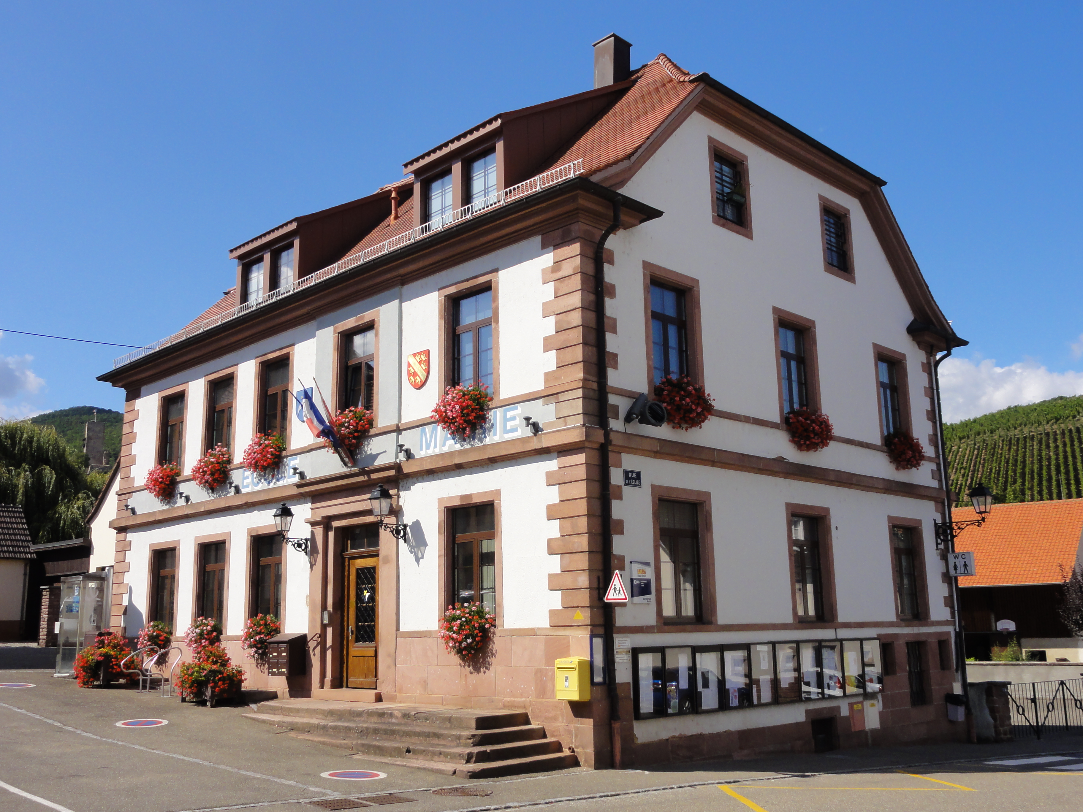 Alsace, Haut-Rhin, Katzenthal, Mairie-école (1839-1905), place de l'Ecole. .